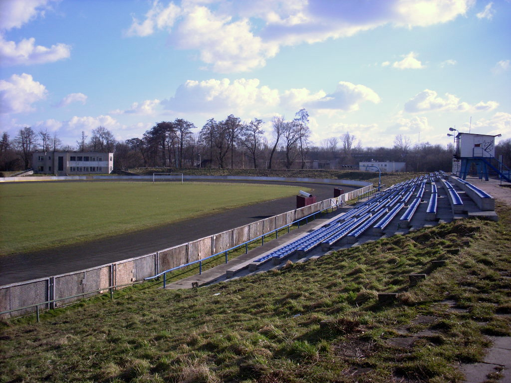 Stadion klubu żużlowego Speedway Wanda Kraków mieszczący się przy ulicy Odmogile